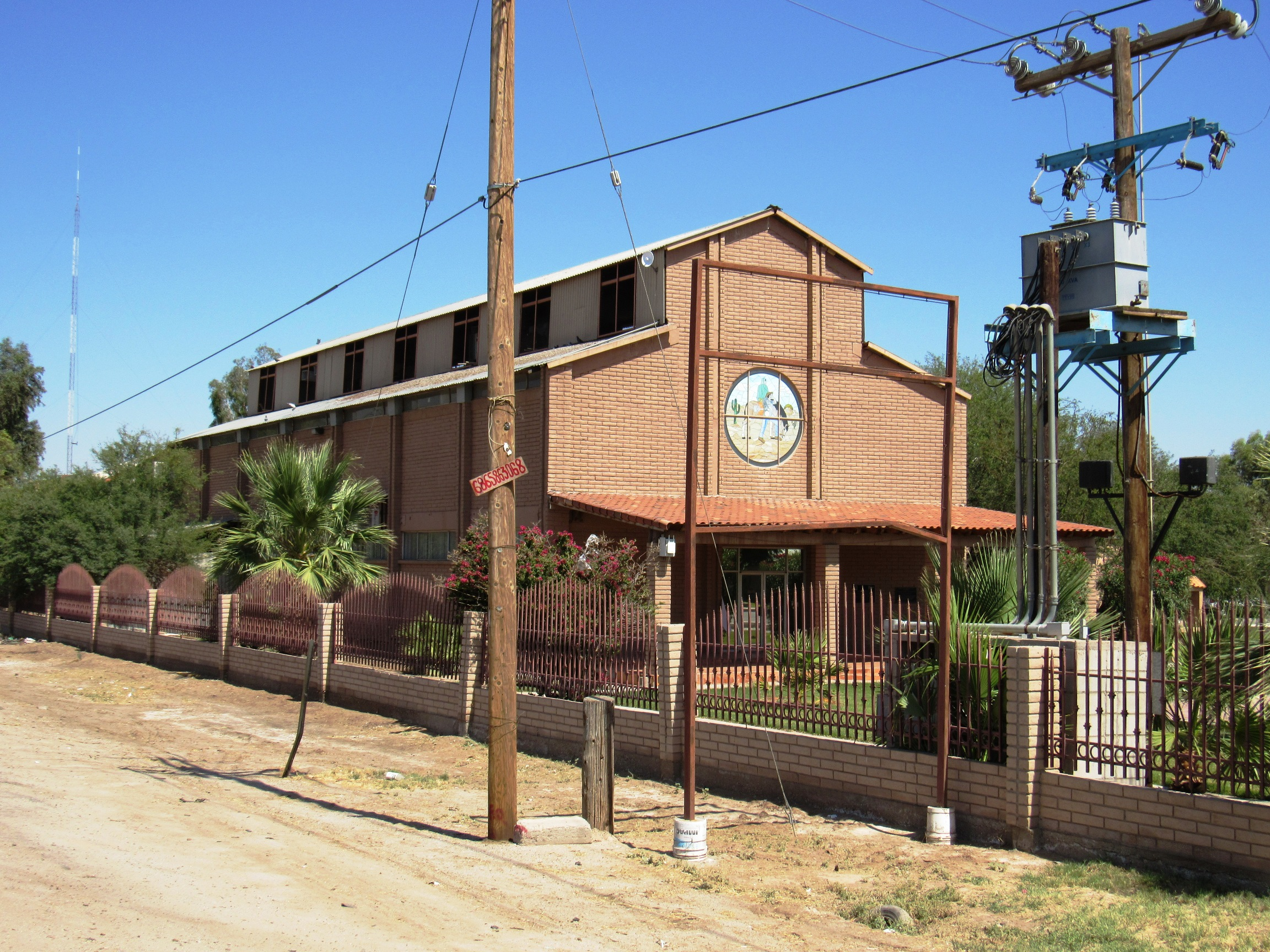 Este edificio alberga las oficinas principales de Secretaría de Fomento Agropecuario del Estado de Baja California.